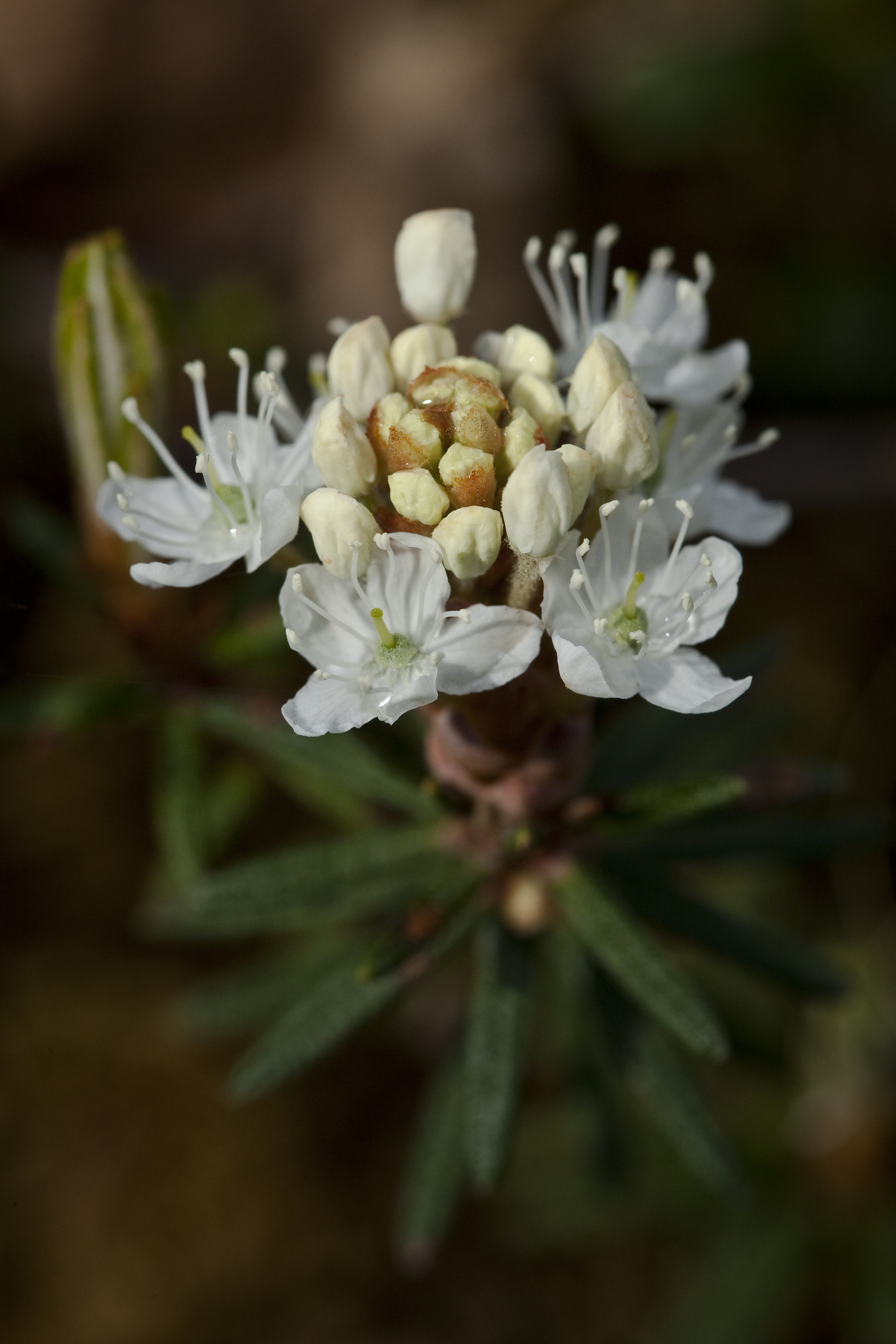 Rhododendron groenlandicum syn. Ledum groenlandicum, Denali National Park and Preserve, AK, USA